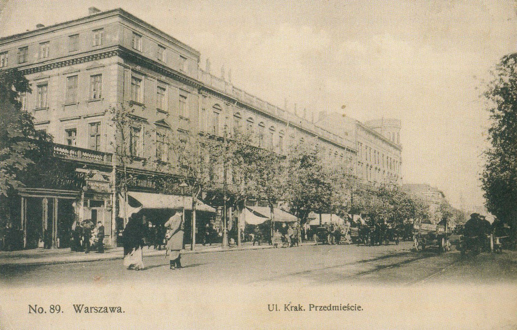 Ulica Krakowskie Przedmieście, Kamienica Józefa Grodzickiego (nr 7)